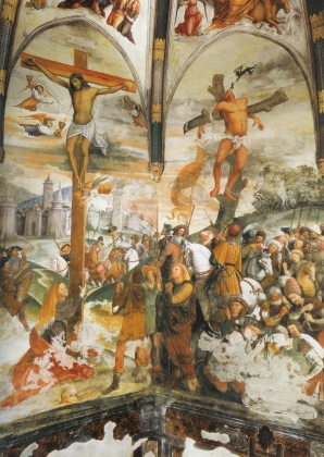 Frescos de Sant'Antonio Abate, San Daniele del Friuli (detail)